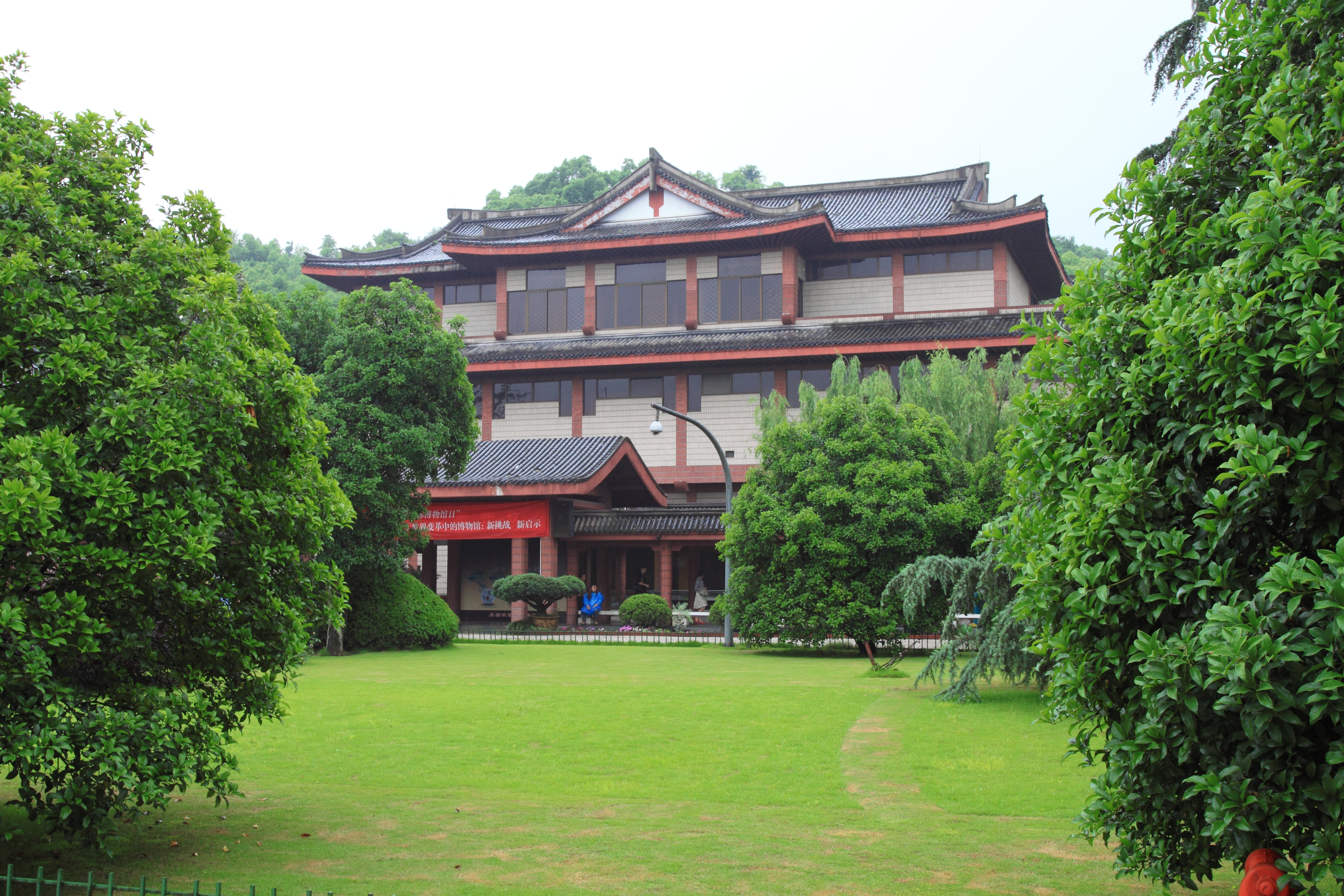 浙江省博物馆，位于中国浙江省杭州市。